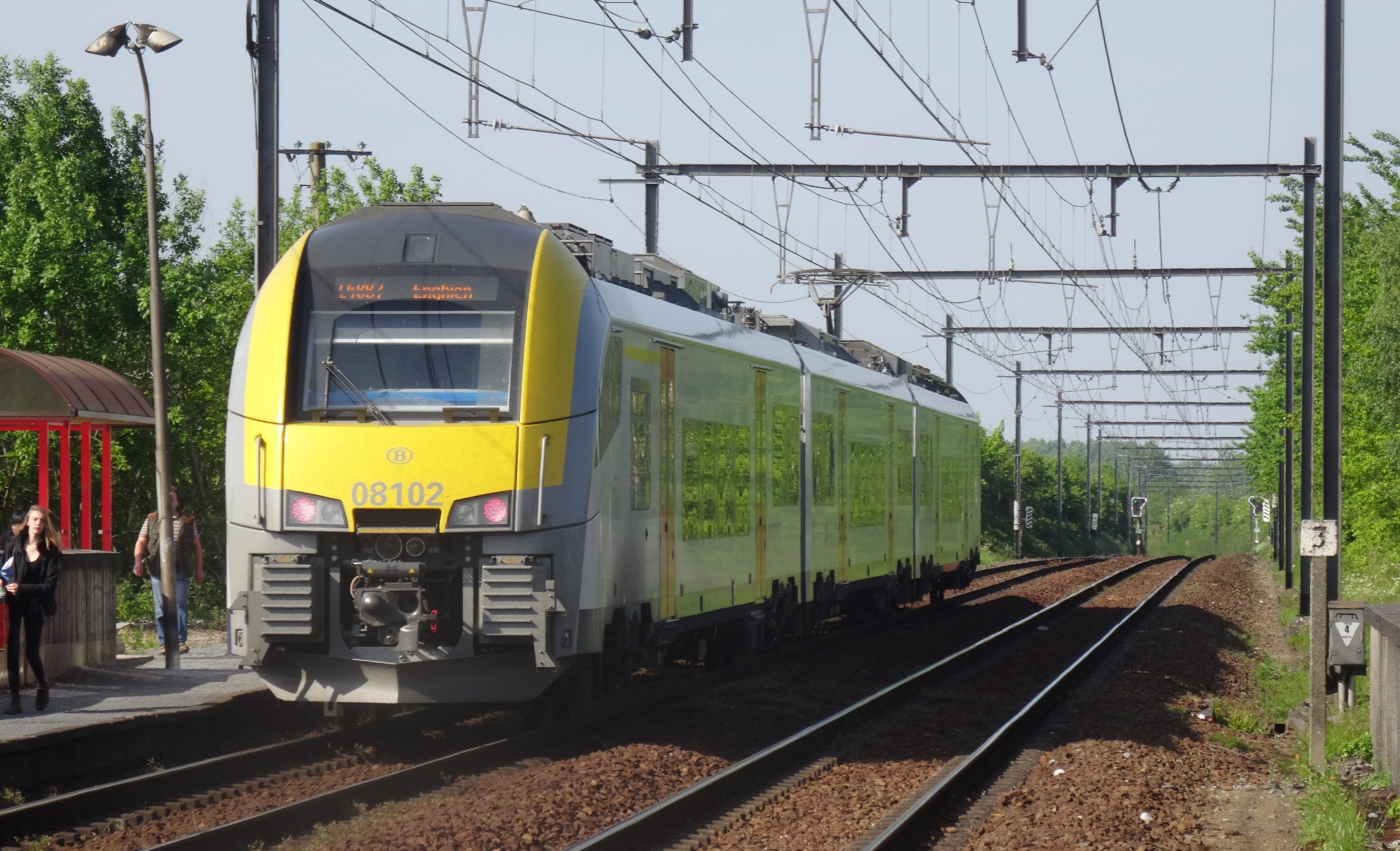 Gare d'Acren, ligne 90, Deux-Acren (Lessines), Belgique.